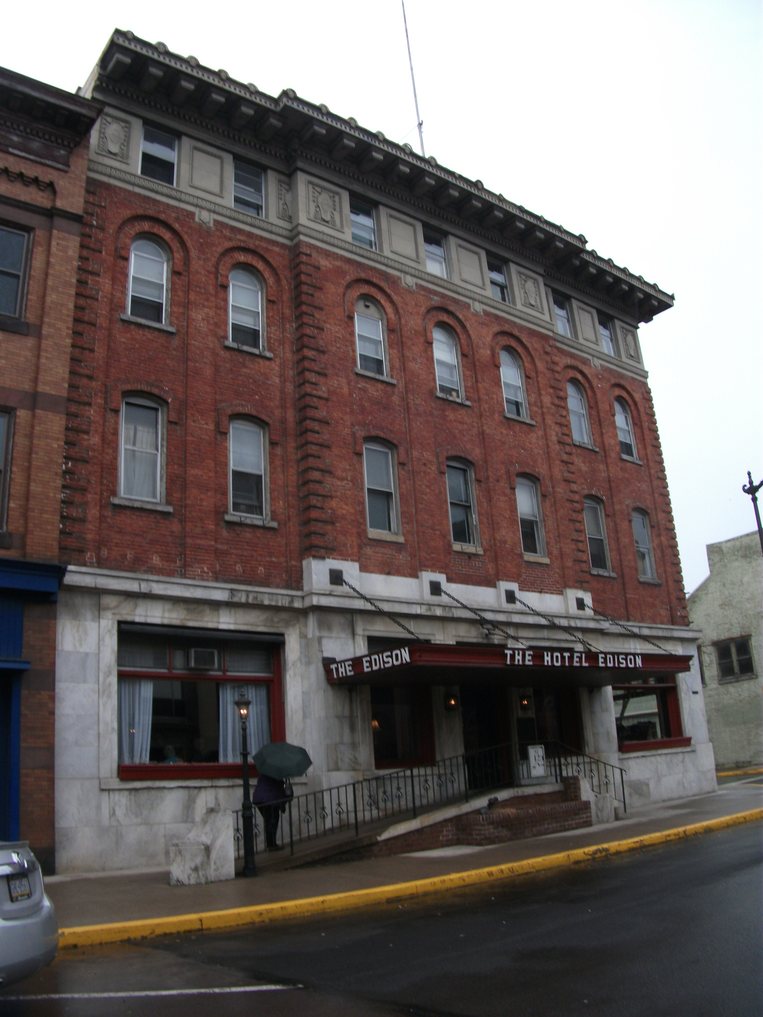 Sunbury, Pennsylvania